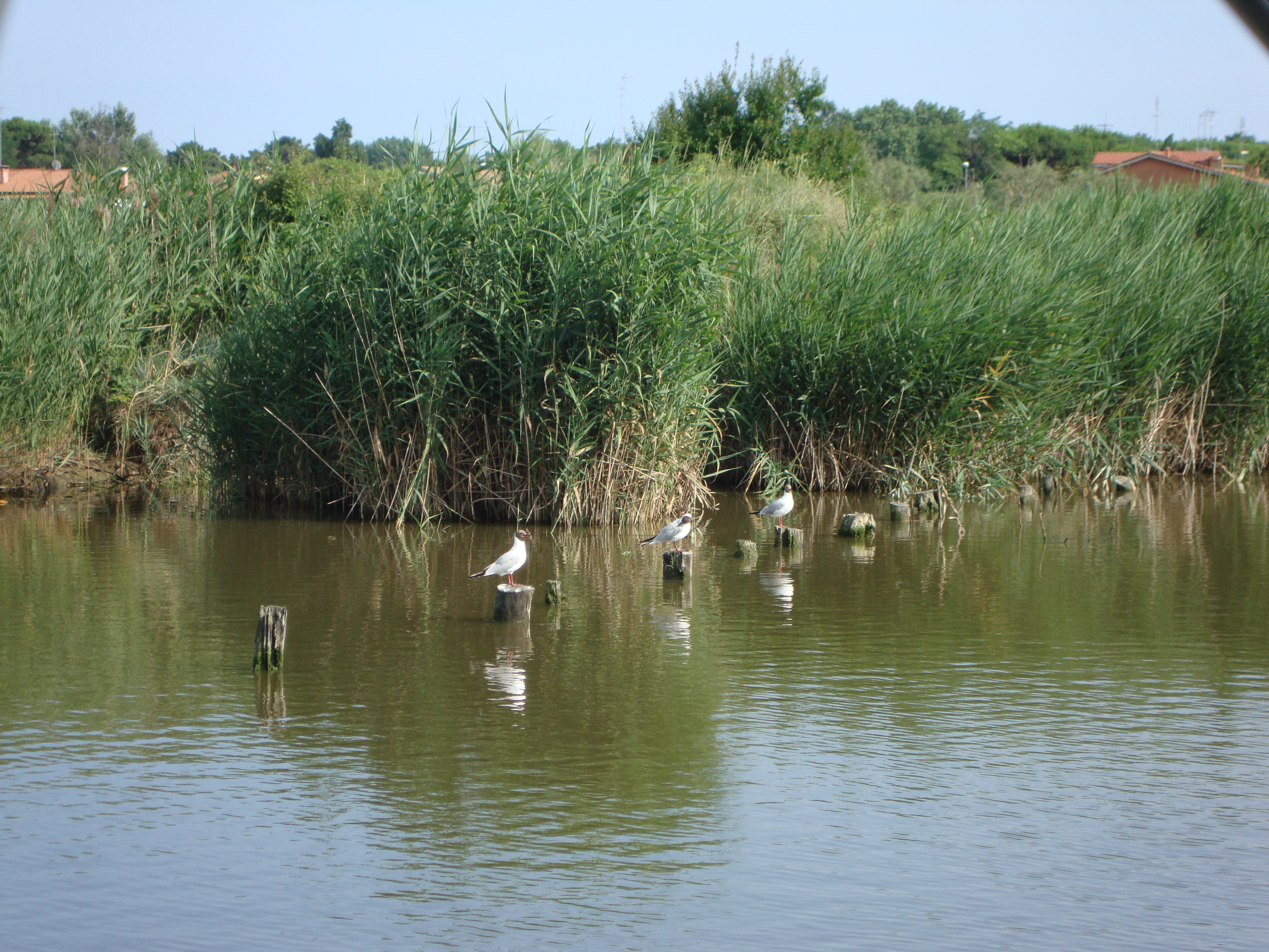 gabbianelle sul po